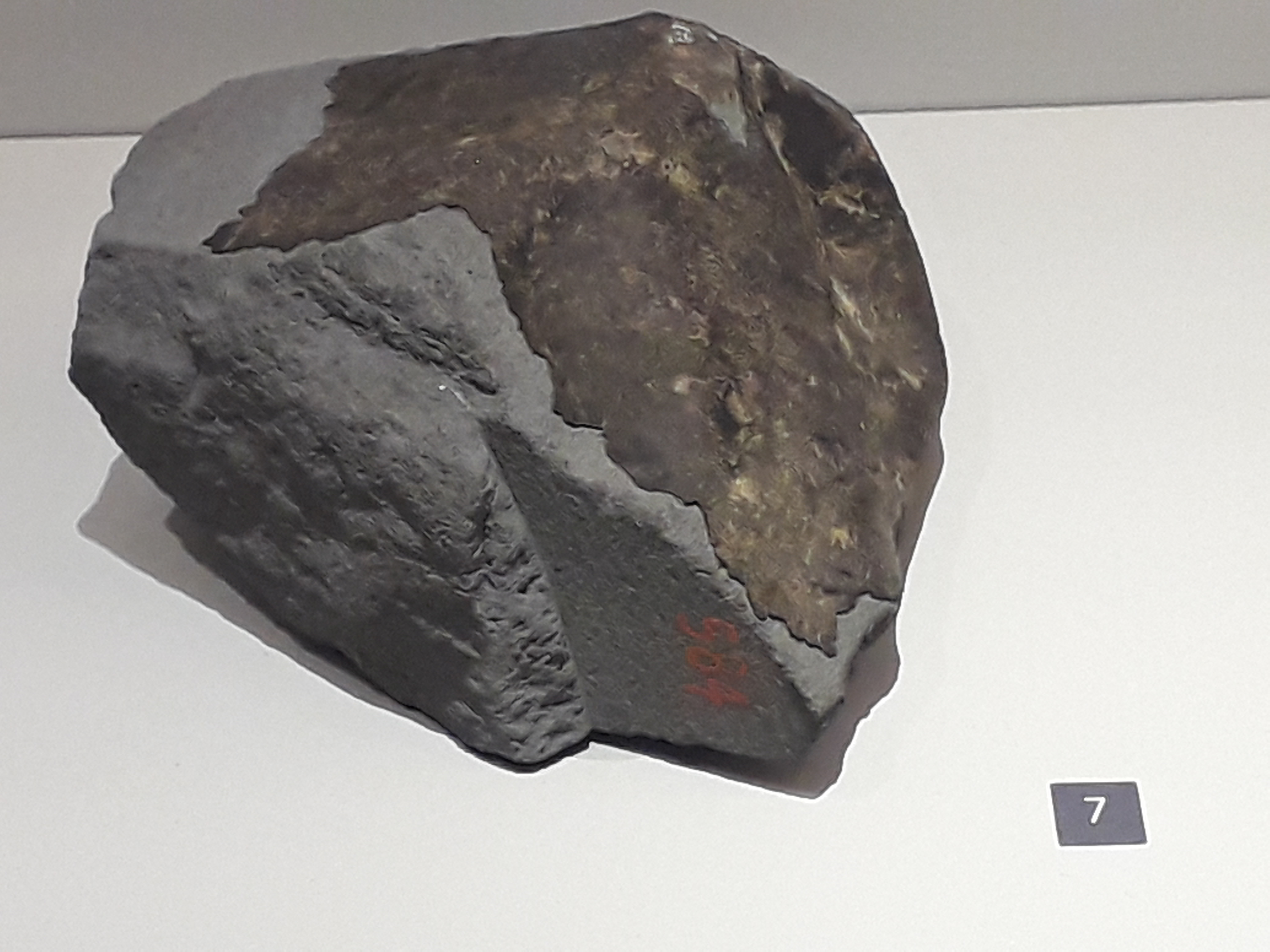 Météorite "Ornans", tombée en France en 1868. Composition : chondrite carbonée (CO3.4). Conservée au Muséum national d'histoire naturelle, Paris (France). Exposée à l'exposition "Météorites, entre ciel et terre", dans le bâtiment de la Grande galerie de l'évolution, au Muséum national d'histoire naturelle, à Paris (France), octobre 2017-10 juin 2018.